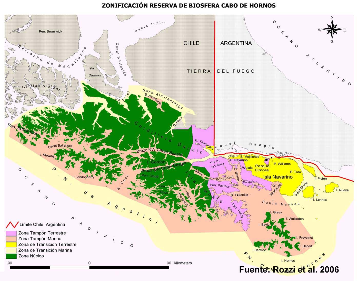 Mapa zonificación RBCH 2005